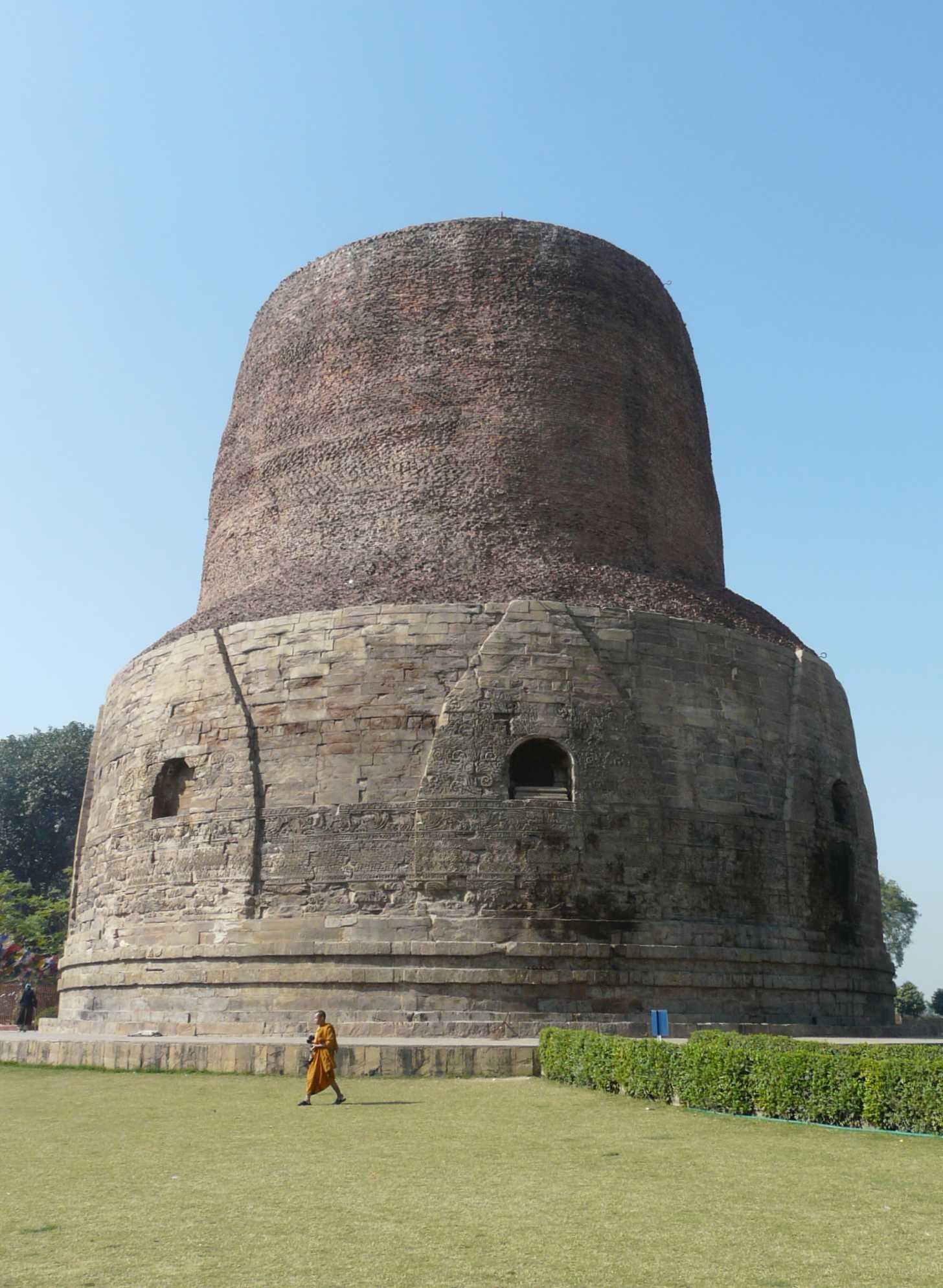 Dhamekh stupa, Sarnath